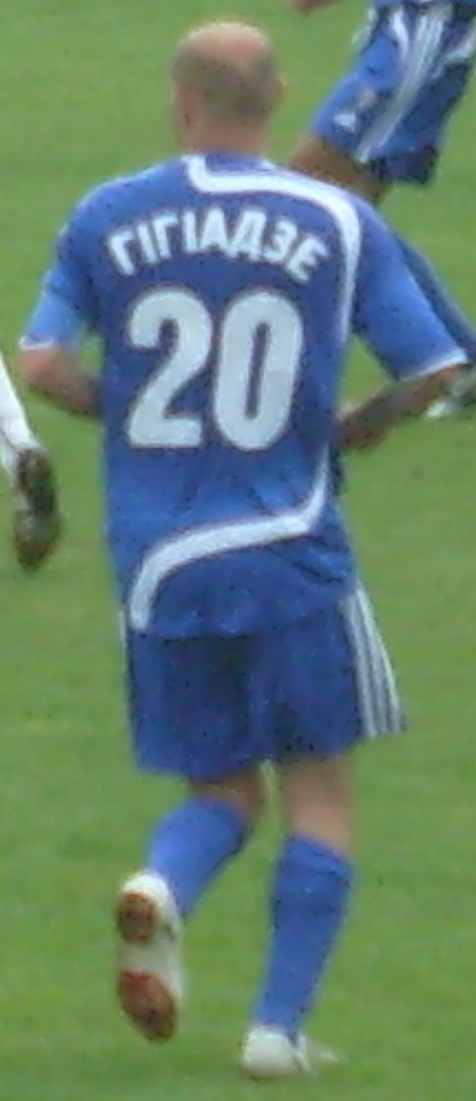 На товарищеском матче Таврия - Кривбасс (1:1)